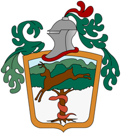 Escudos de Jalisco